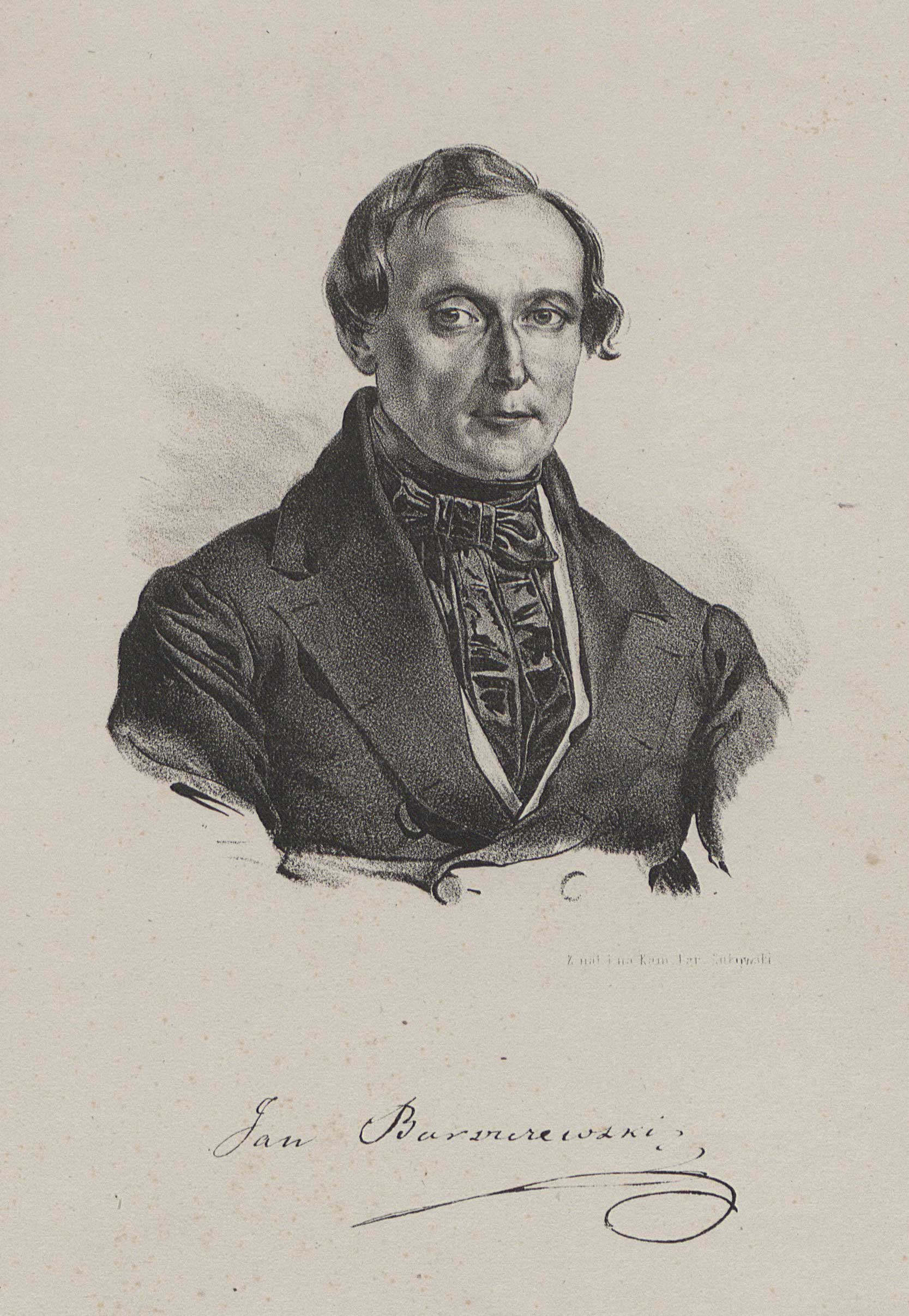 Беларуская (тарашкевіца): Партрэт Яна Баршчэўскага (Jan Barščeŭski)